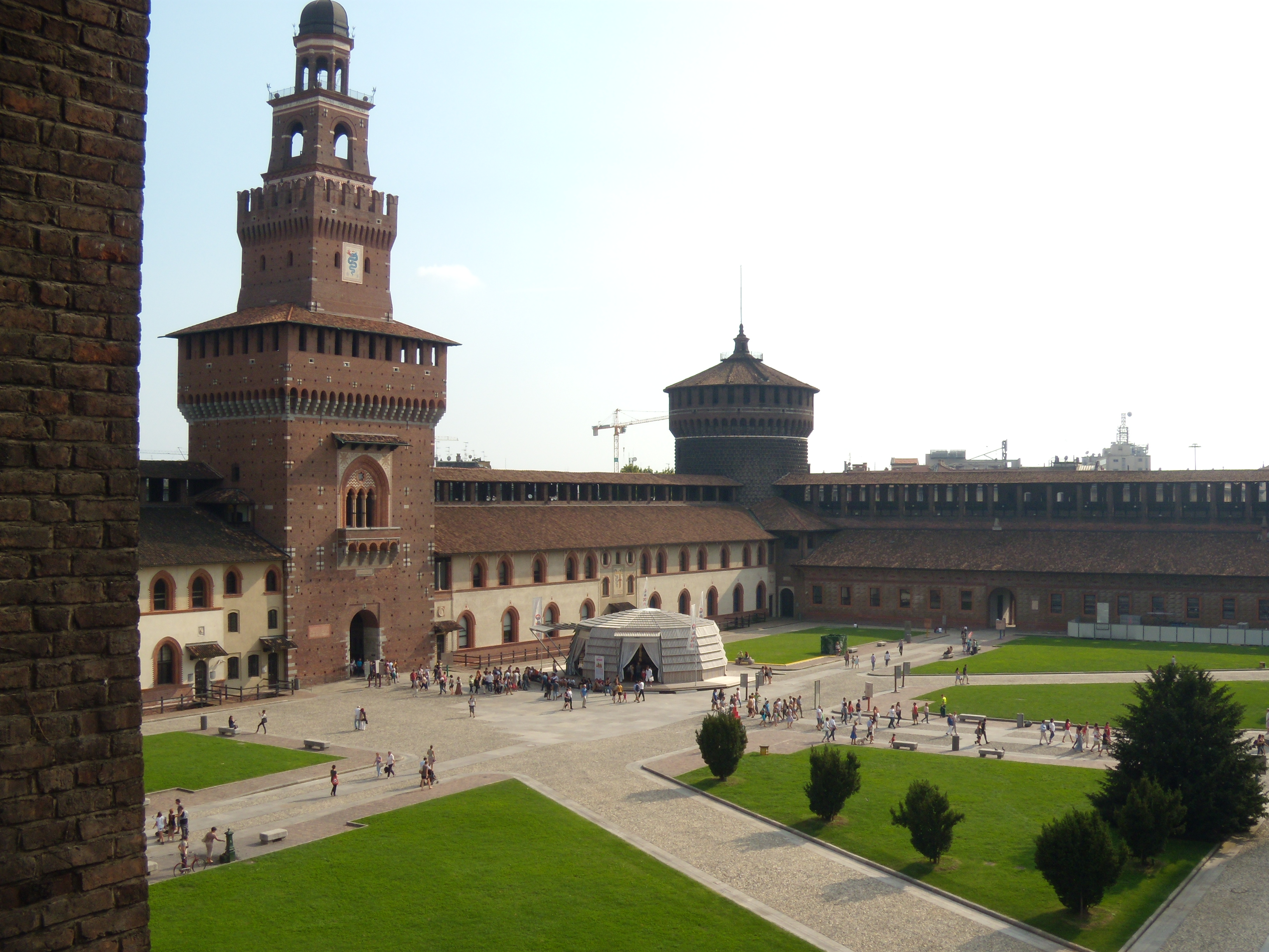 Castello Sforzesco: Corte Maggiore vista dalle merlate (2014) This is a photo of a monument which is part of cultural heritage of Italy.